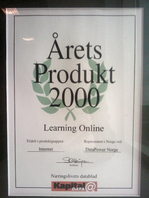 Foto av plakett "Årets produkt 2000" fra Kapital Data.